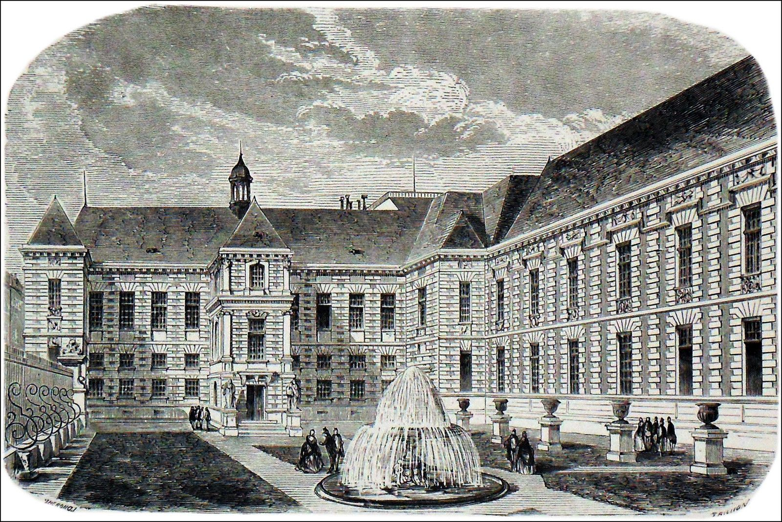 Arrière de l'Hôtel Tubeuf, côté jardin, le long de la rue Vivienne